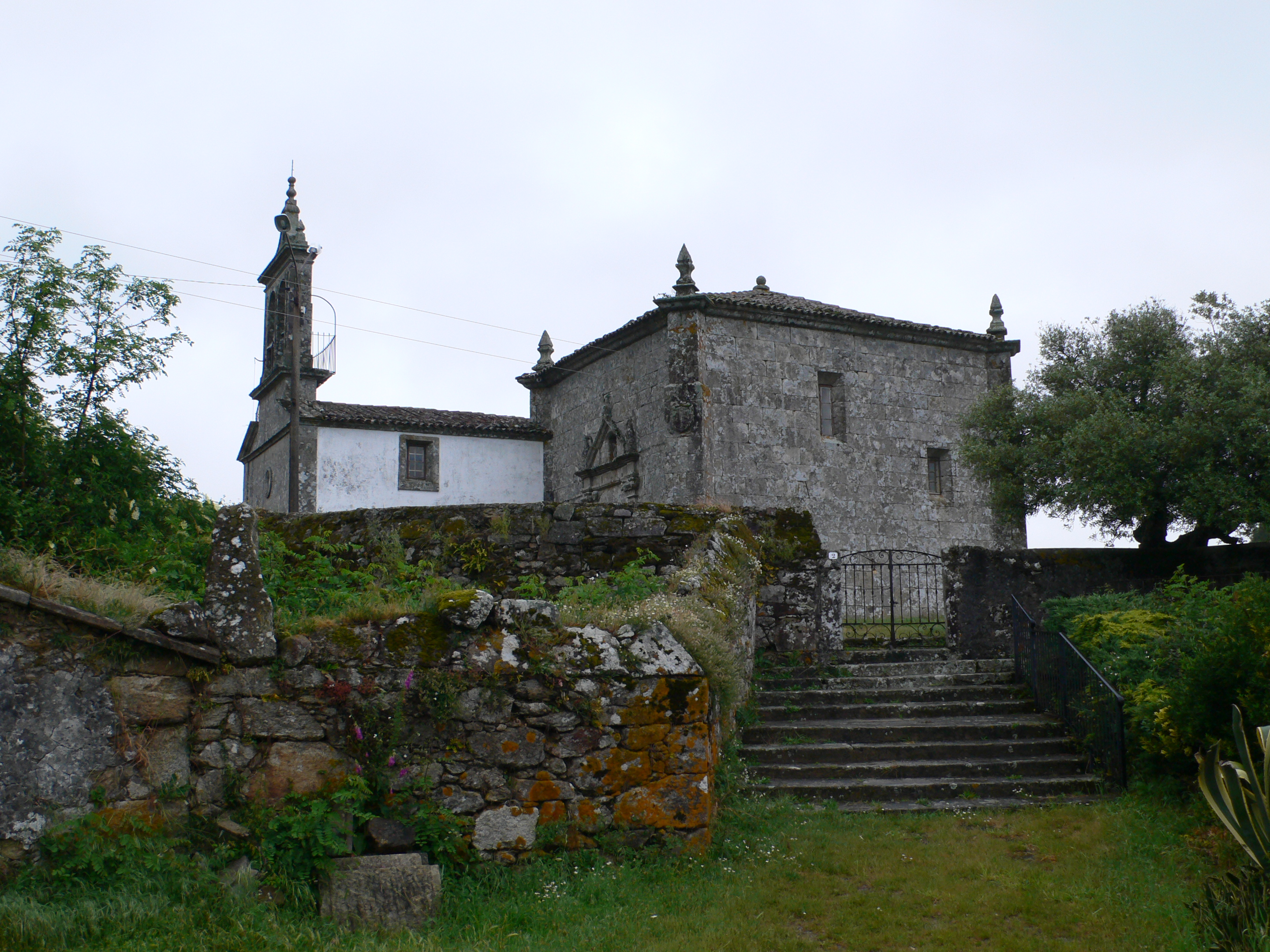 Igrexa de San Salvador de Cervaña, Silleda